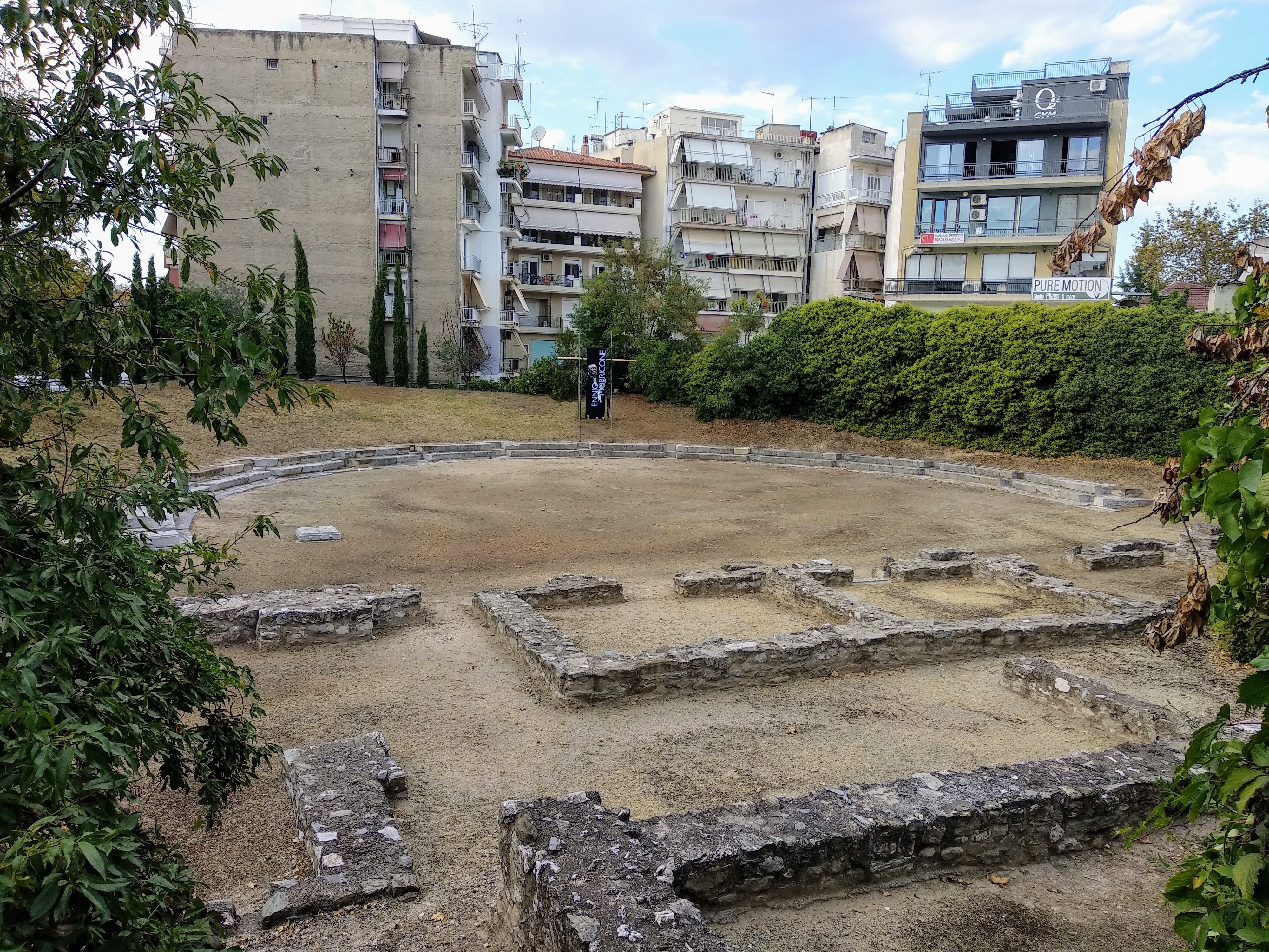 Αρχαίο θέατρο Β΄ Λάρισας«Αρχαίο θέατρο Β΄ Λάρισας»